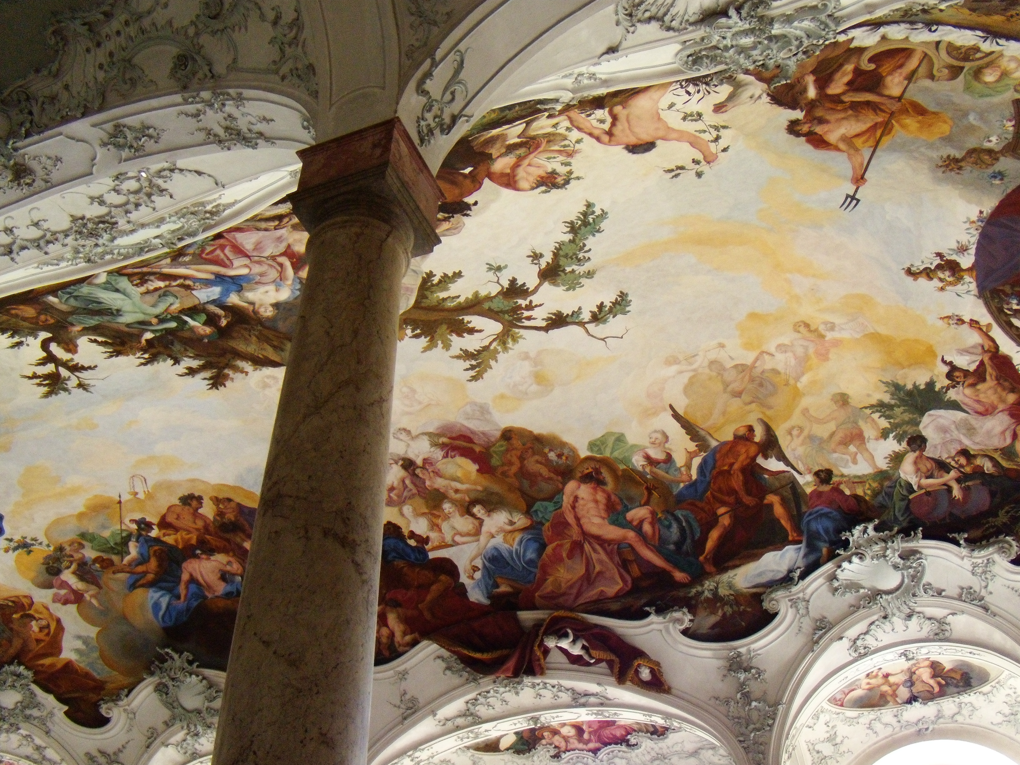 Tiepolo, inside Residenz, Würzburg, 22 Aug 2010